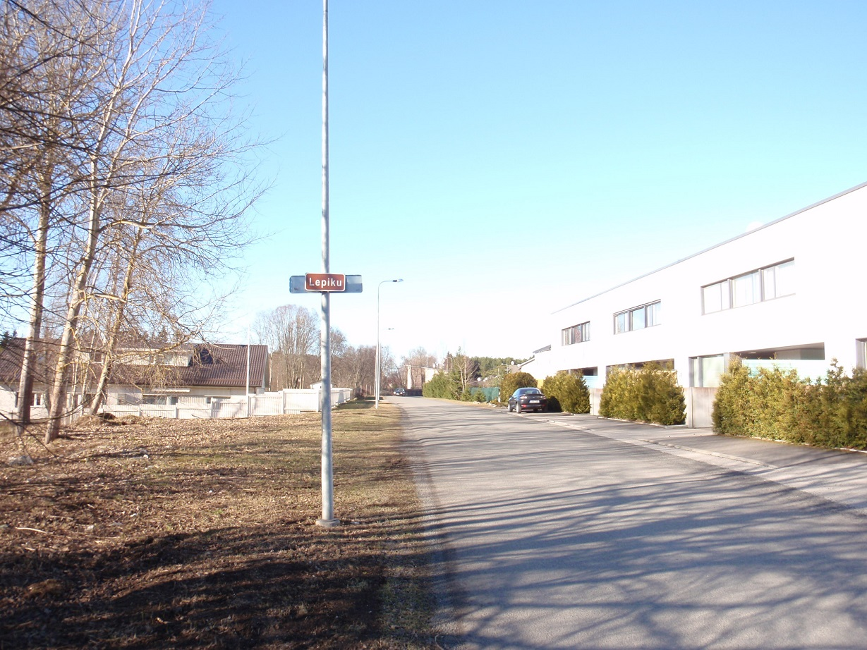 Lepiku tee